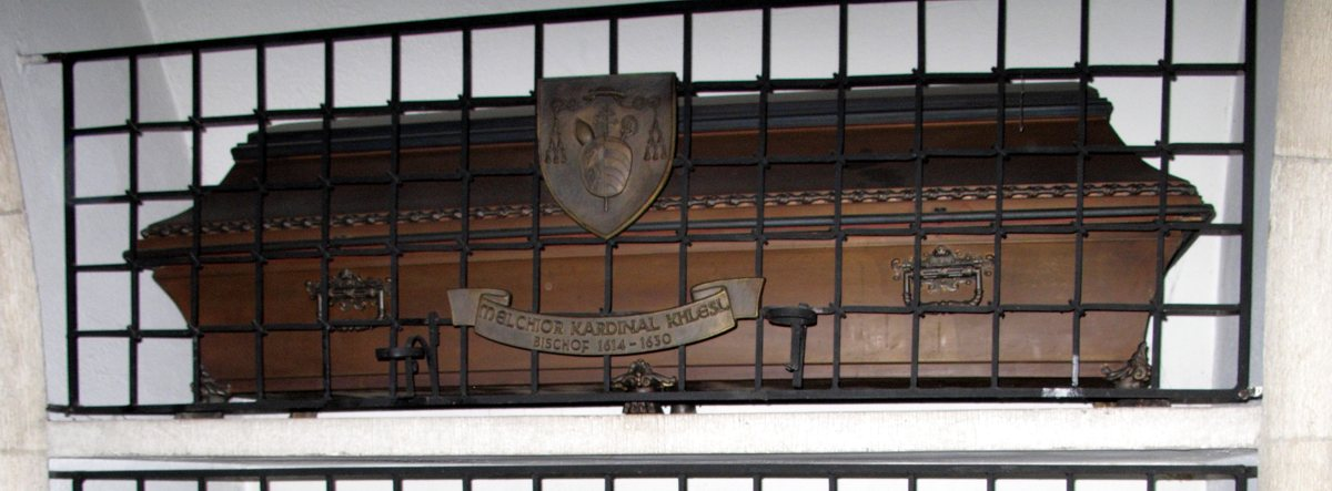 Sarg Melchior Kardinal Khlesls in der Bischofsgruft des Stephansdoms, Wien